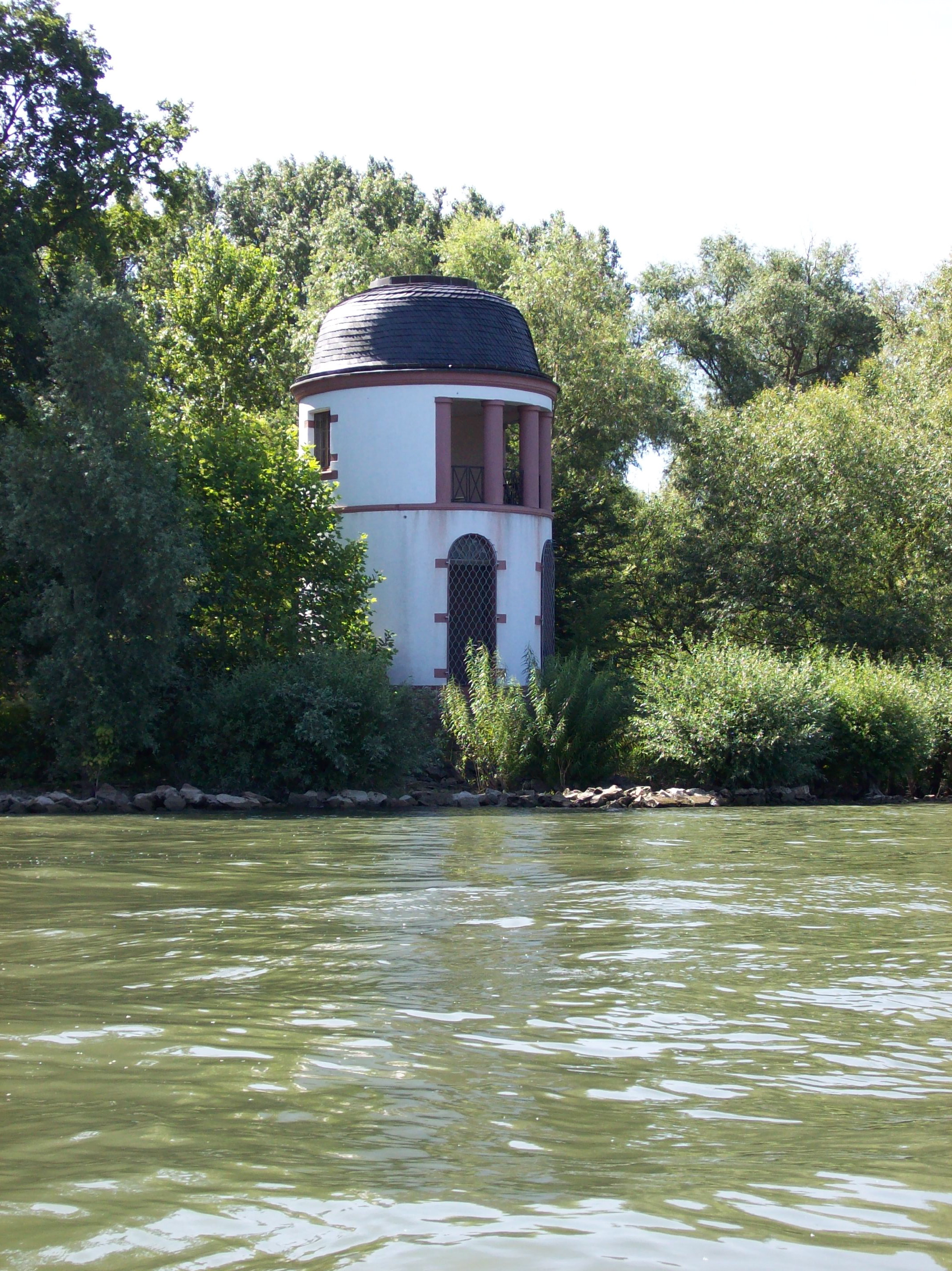 Aussichtsturm Königsklinger Aue (Rheingau)